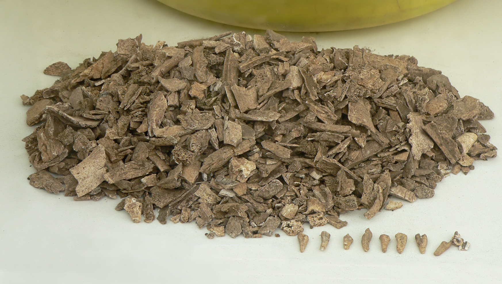 Leichenbrand mit menschlichen Zähne vorne rechts der Ausgrabung Gewerbegebiet Lemke